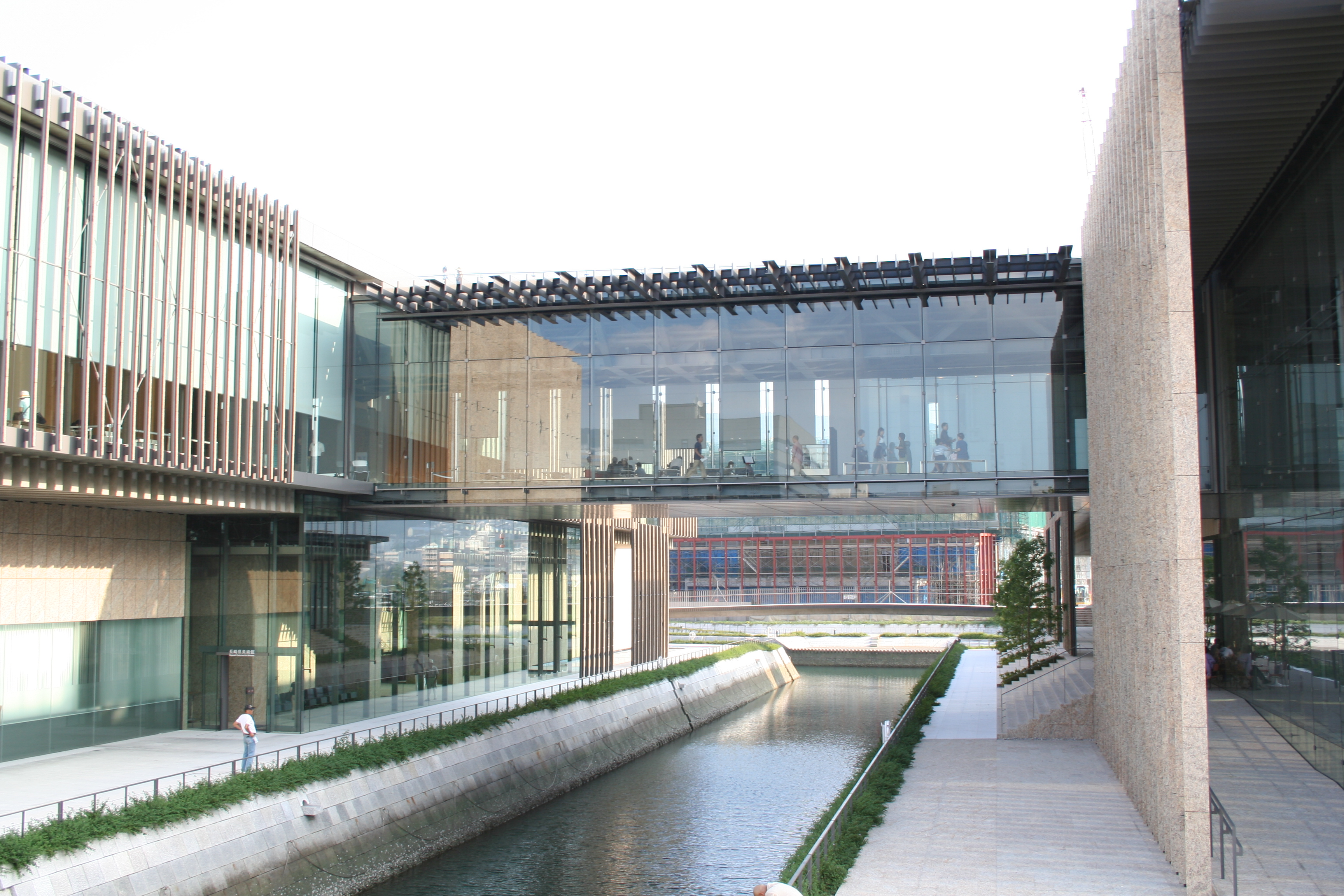 Nagasaki Prefectural Art Museum, Nagasaki, Japan that opened in 2005